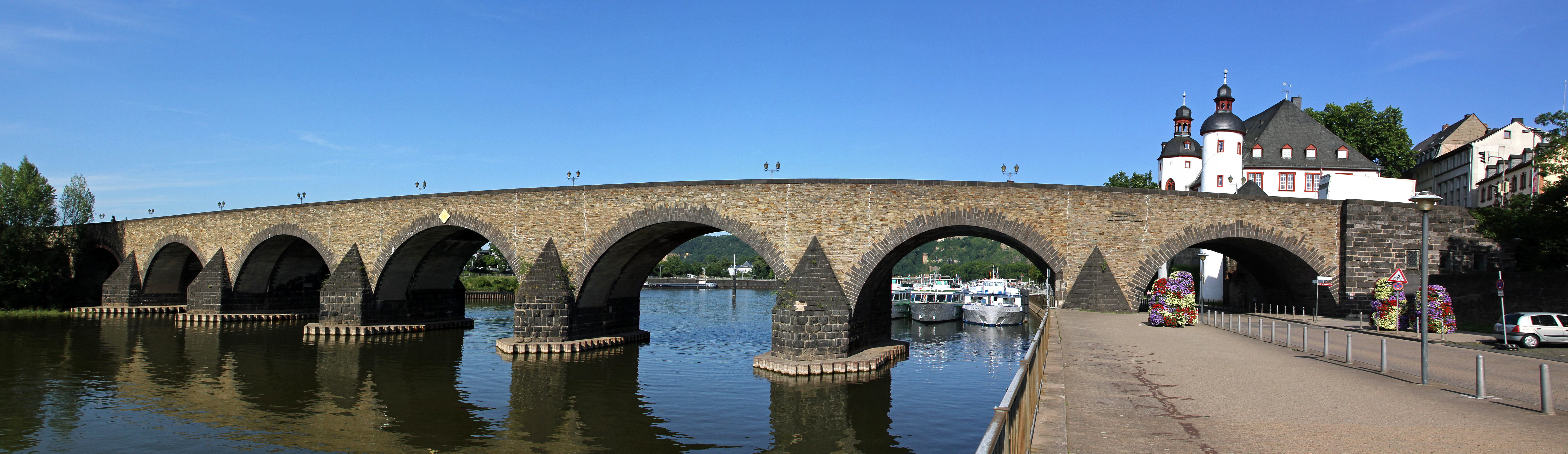 Koblenz im Buga-Jahr 2011 - Die Balduinbrücke (Ansicht von Westen)